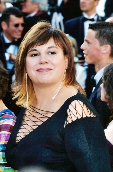 Michèle Bernier au festival de Cannes.